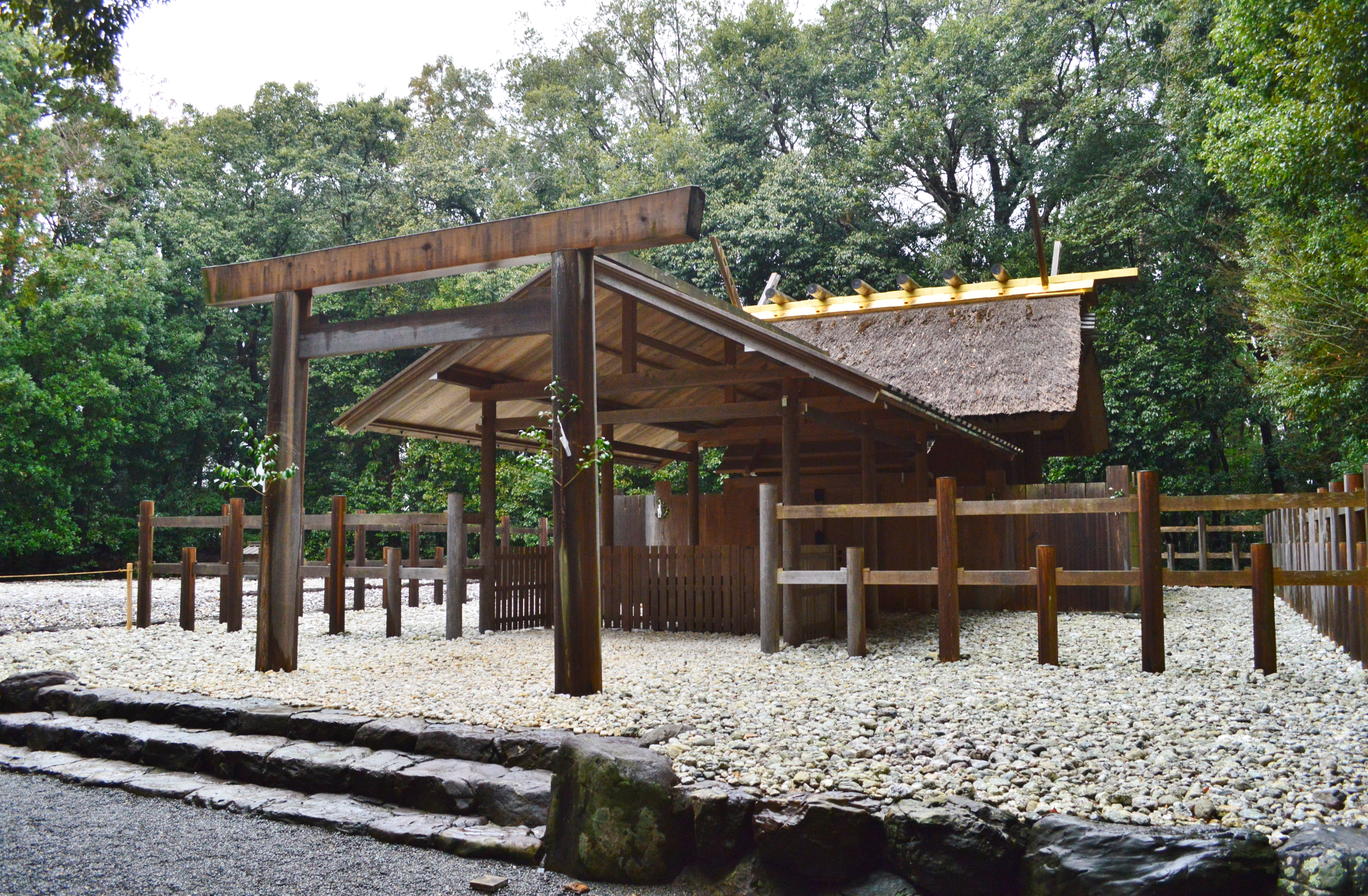 倭姫宮 社殿